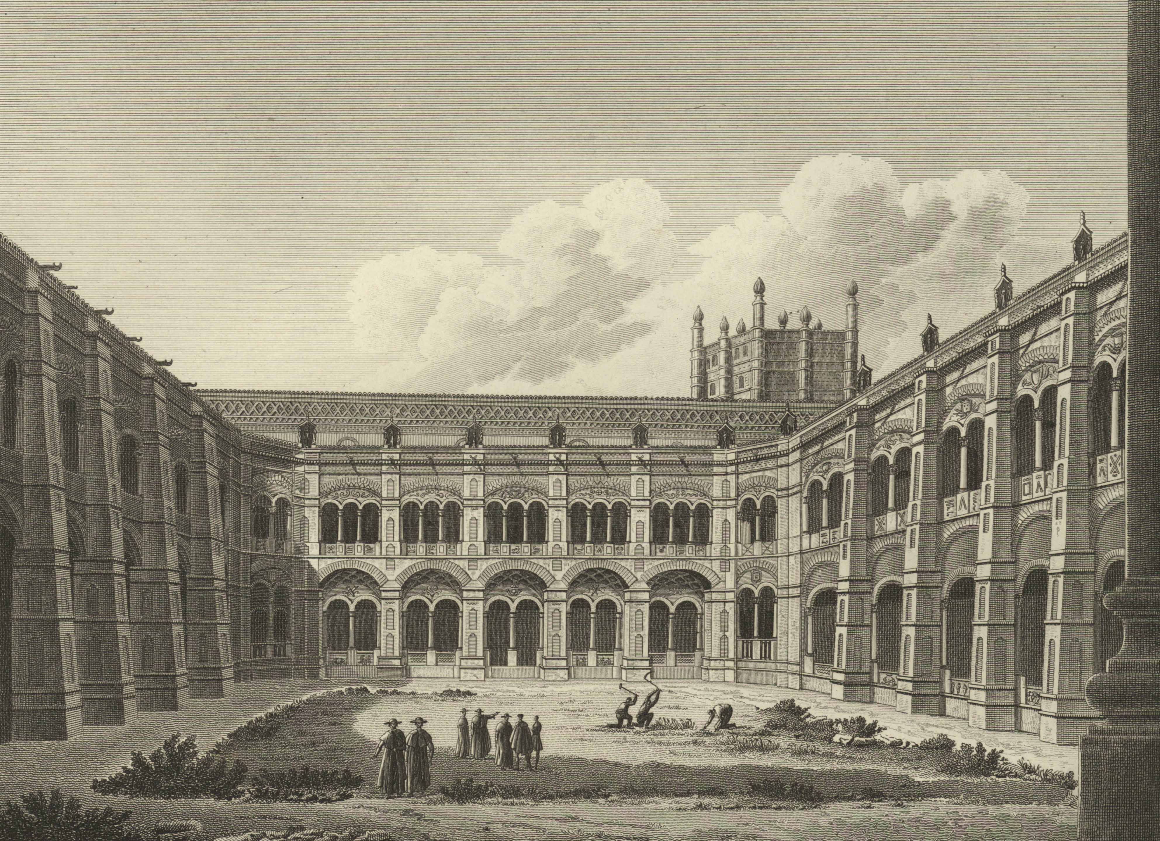 Vista interior del convento de Santa Engracia.